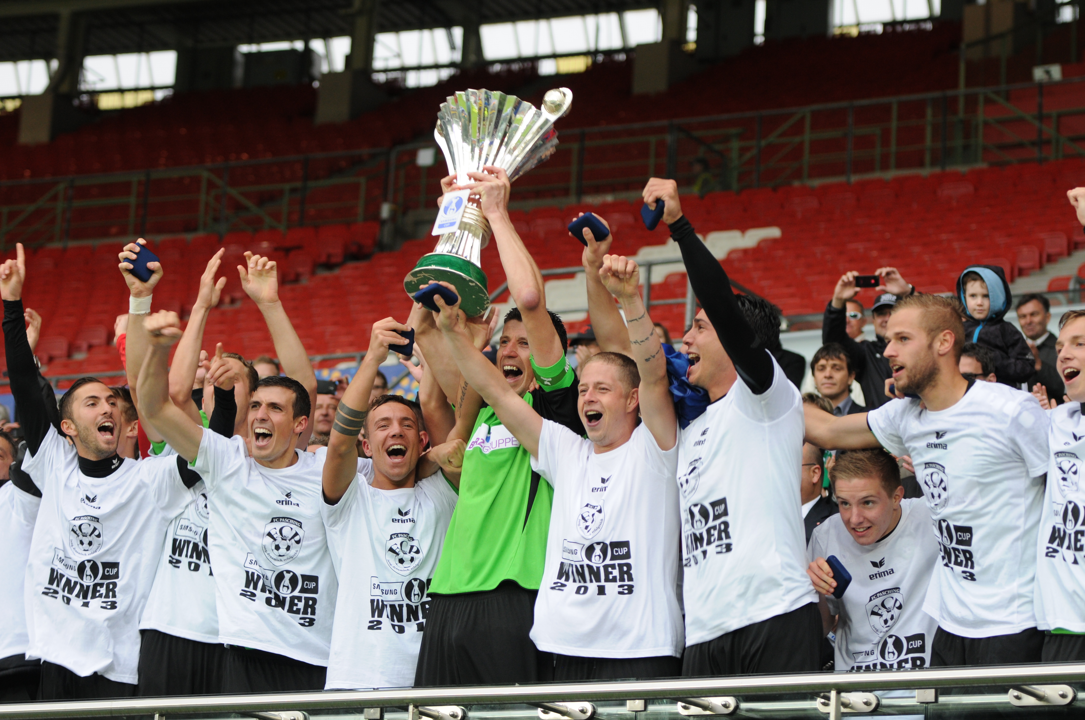 ÖFB-Cupfinale am 30. Mai 2013 im Ernst-Happel-Stadion (FC Pasching gegen Austria Wien 1:0) . Im Bild die Spieler des FC Pasching nach der Übergabe des ÖFB-Cups.